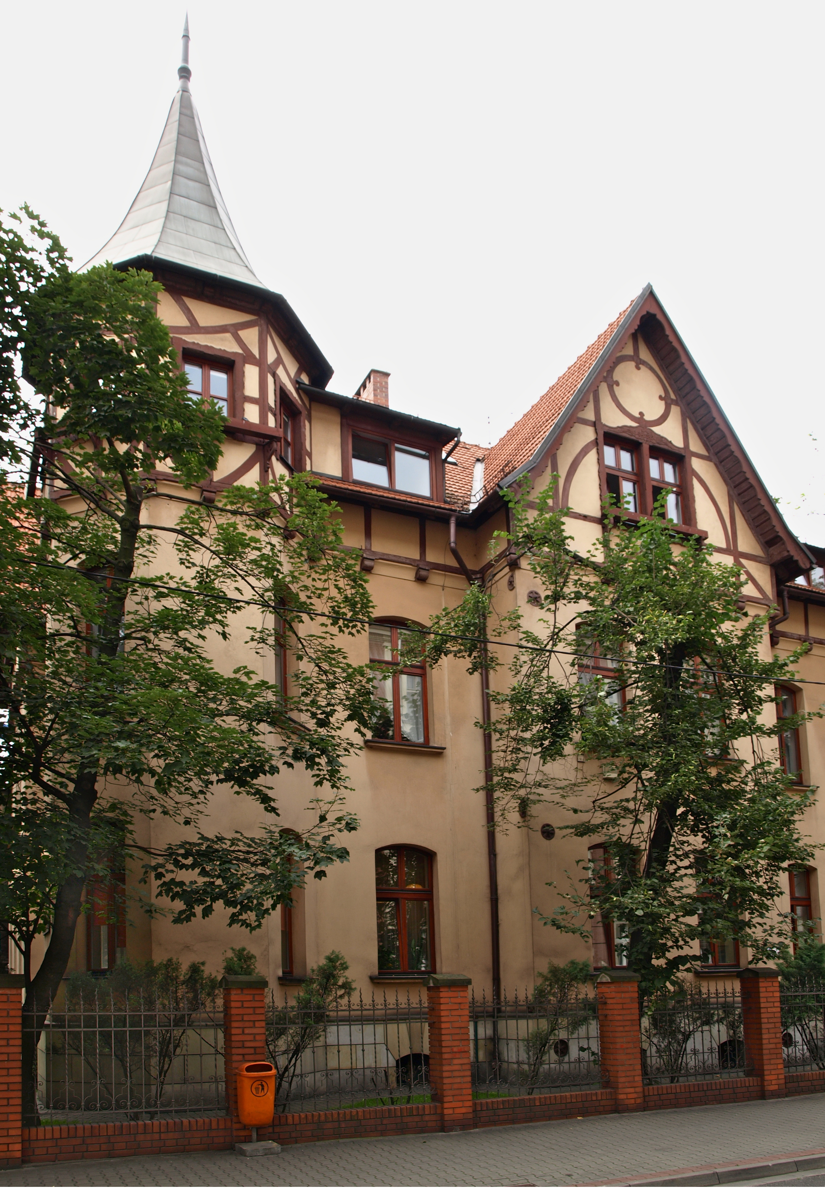 Willa tzw. willa Louisa Damego, wzniesiona została około 1900 w stylu historyzmu. Katowice, ul. Sokolska 8, Katowice